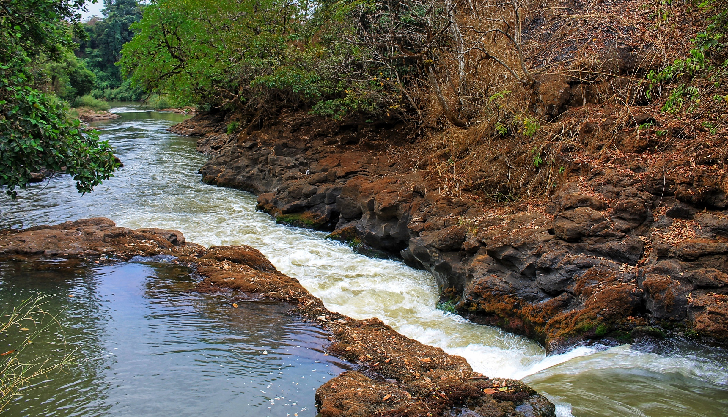 Les chutes d'eau de la Vina dans la ville de N'Gaoundéré. Région : Adamaoua